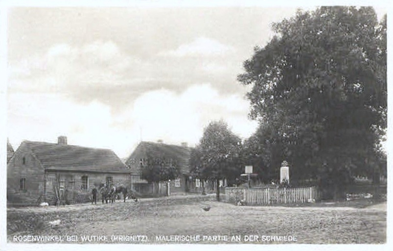 Ansichtskarte der Gemeinde Rosenwinkel bei Wutike in der Prignitz („Malerische Partie an der Schmiede“)